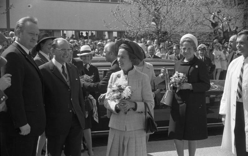 Staatsbesuch des belgischen Königspaares bei Siemens München